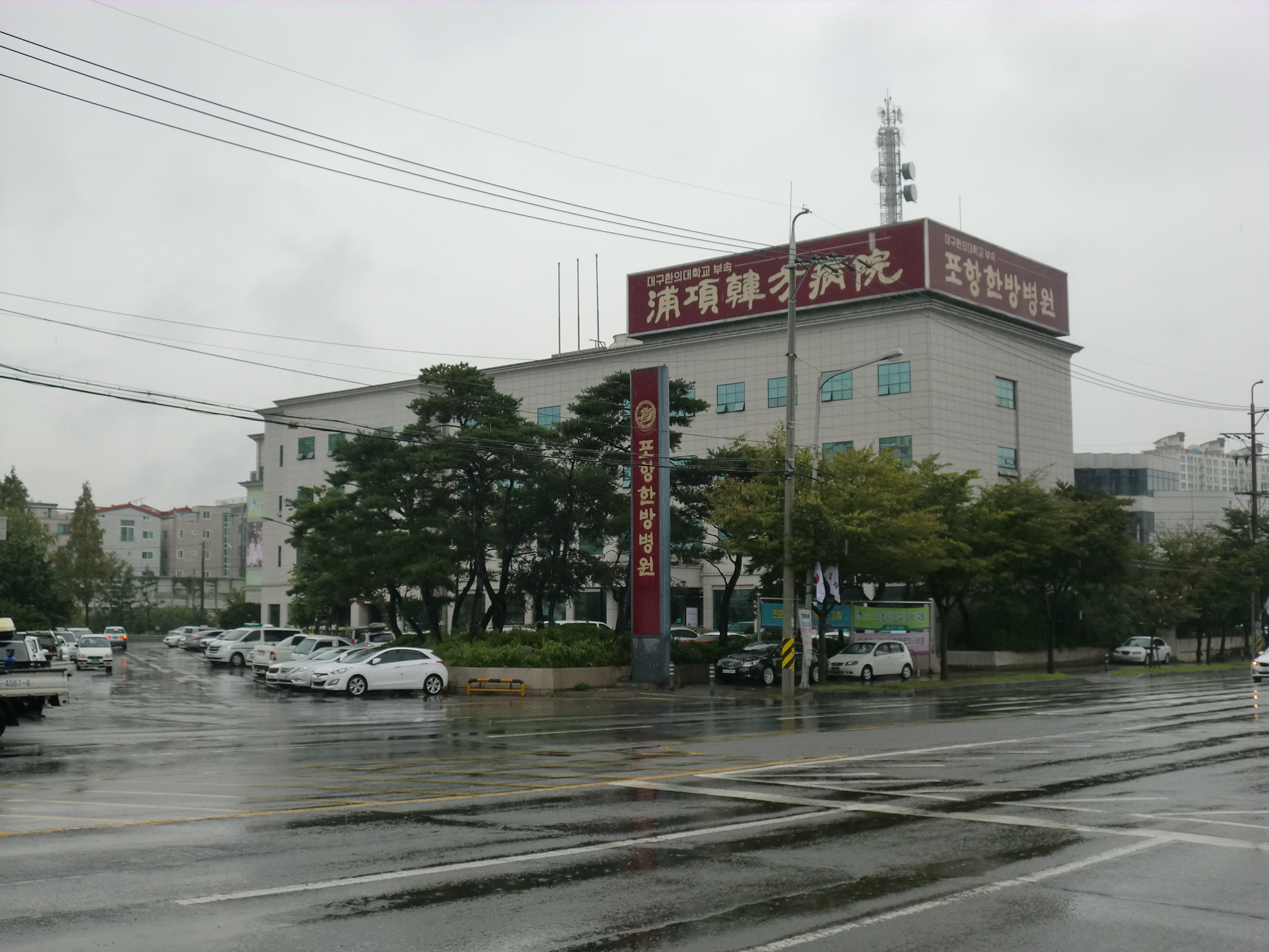 경상북도 포항시에 있는 대구한의대학교부속포항병원